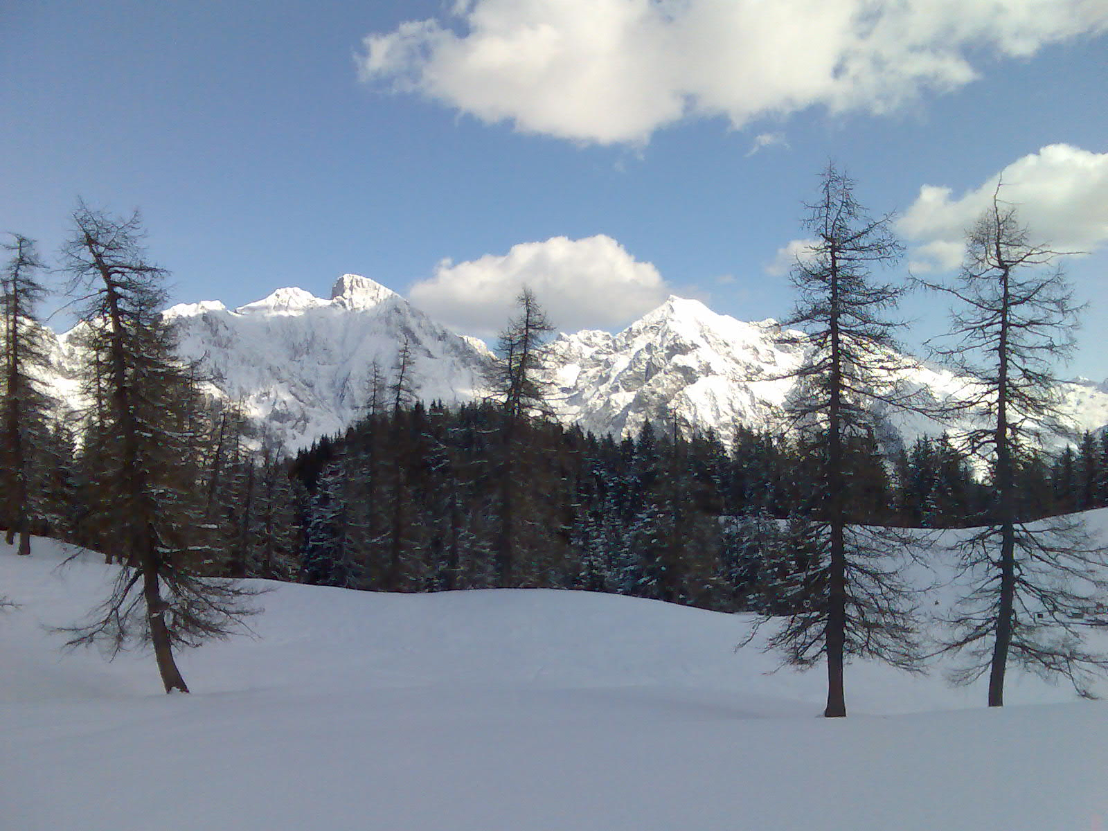 Cimone della Bagozza (2418 m) a sinistra, e Concarena (2565 m) a destra, in veste invernale.